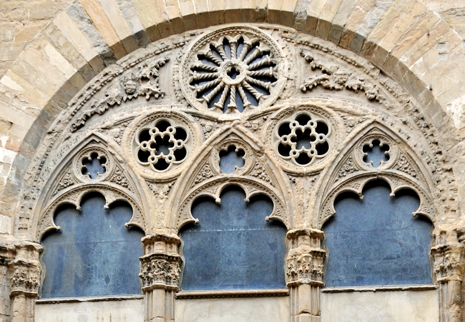 Lunette Orsanmichele boven ingang aan de Via del Calzaiuoli; een voorbeeld van Florentijnse Gotiek